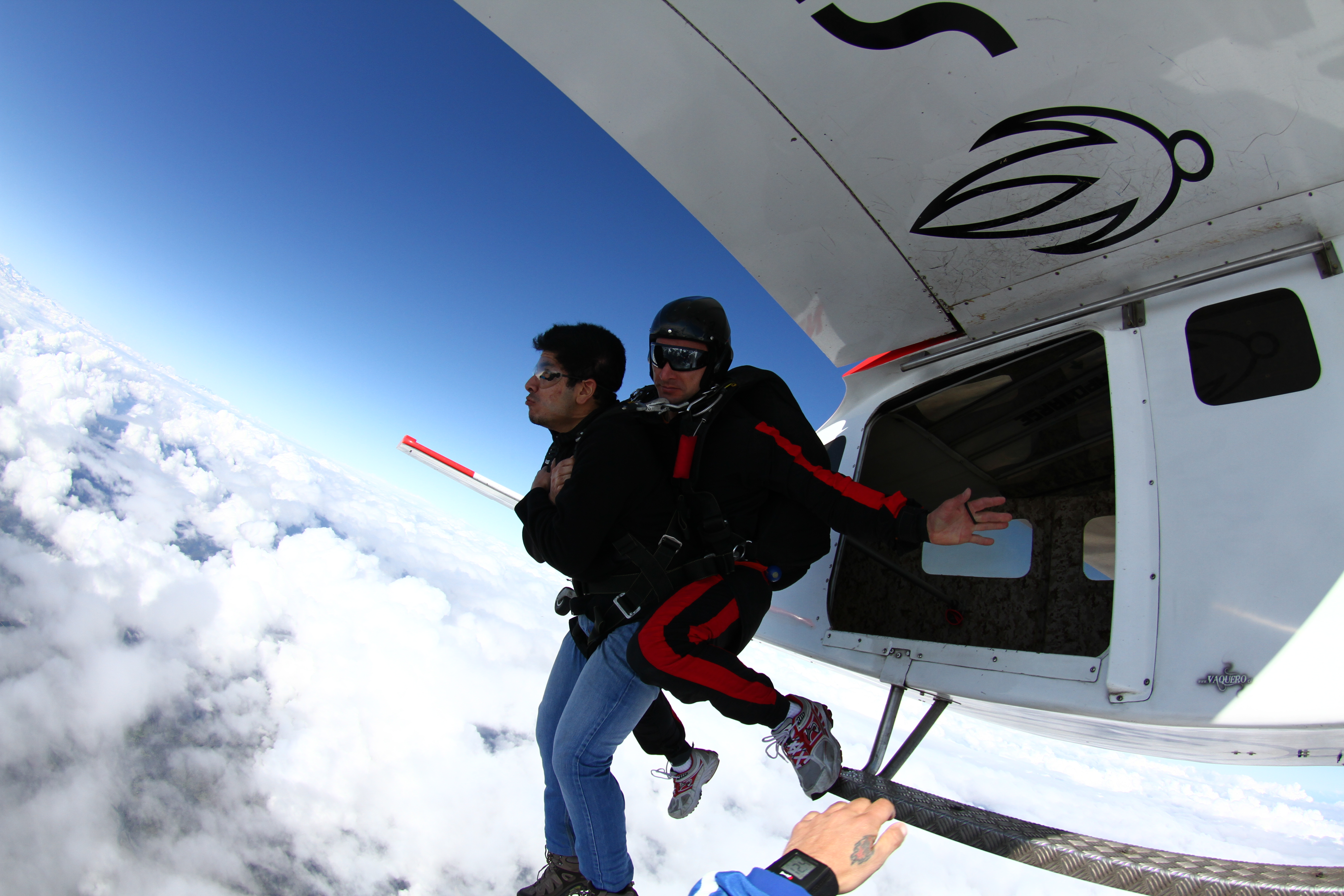 Fernando Vidal 3